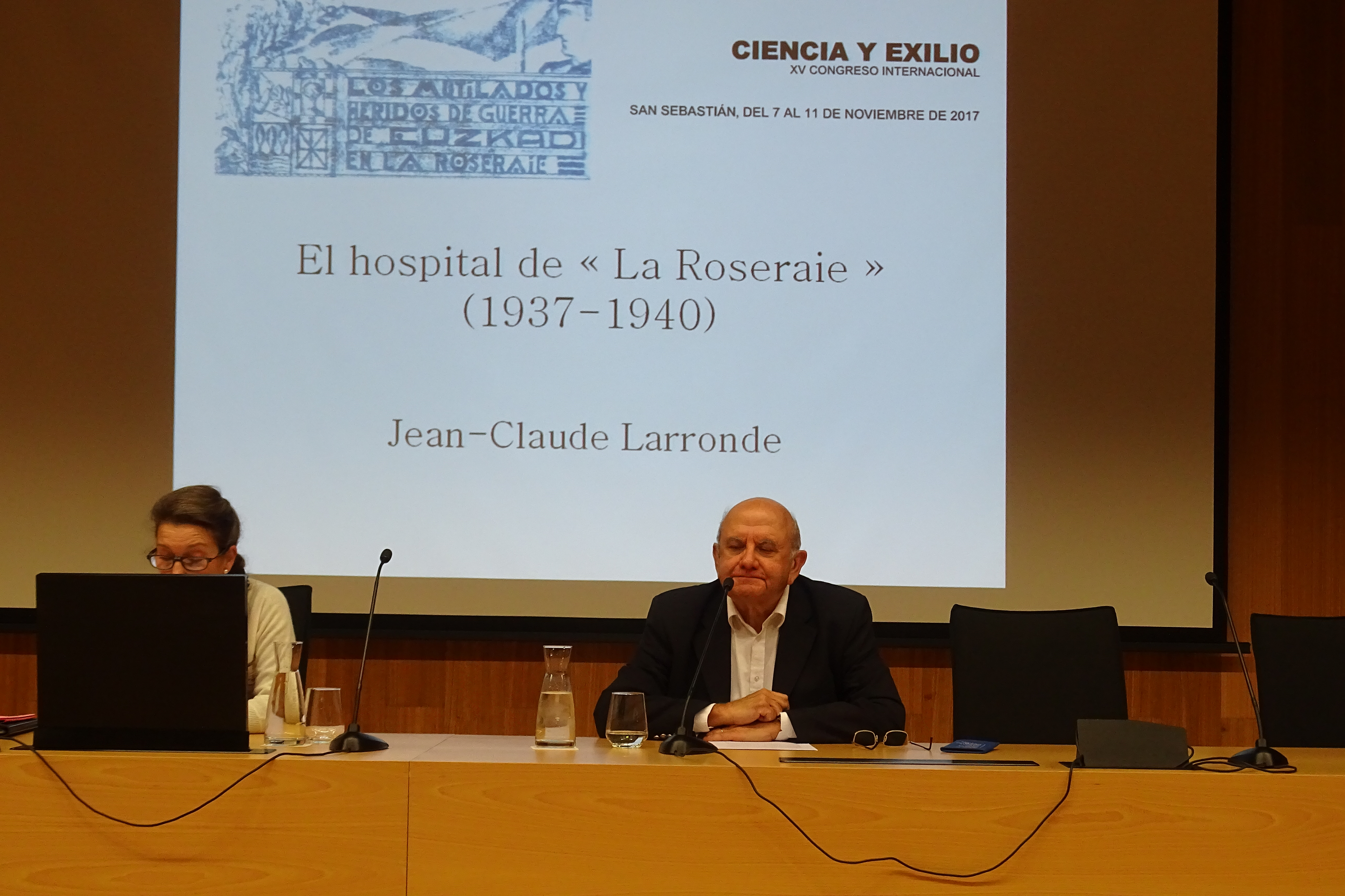 Jean-Claude Larronde eta Maia Ajuriagerra, Donostian, 2017ko azaroan.